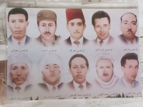 Groupe 2 de la révolution à Ain M'lila